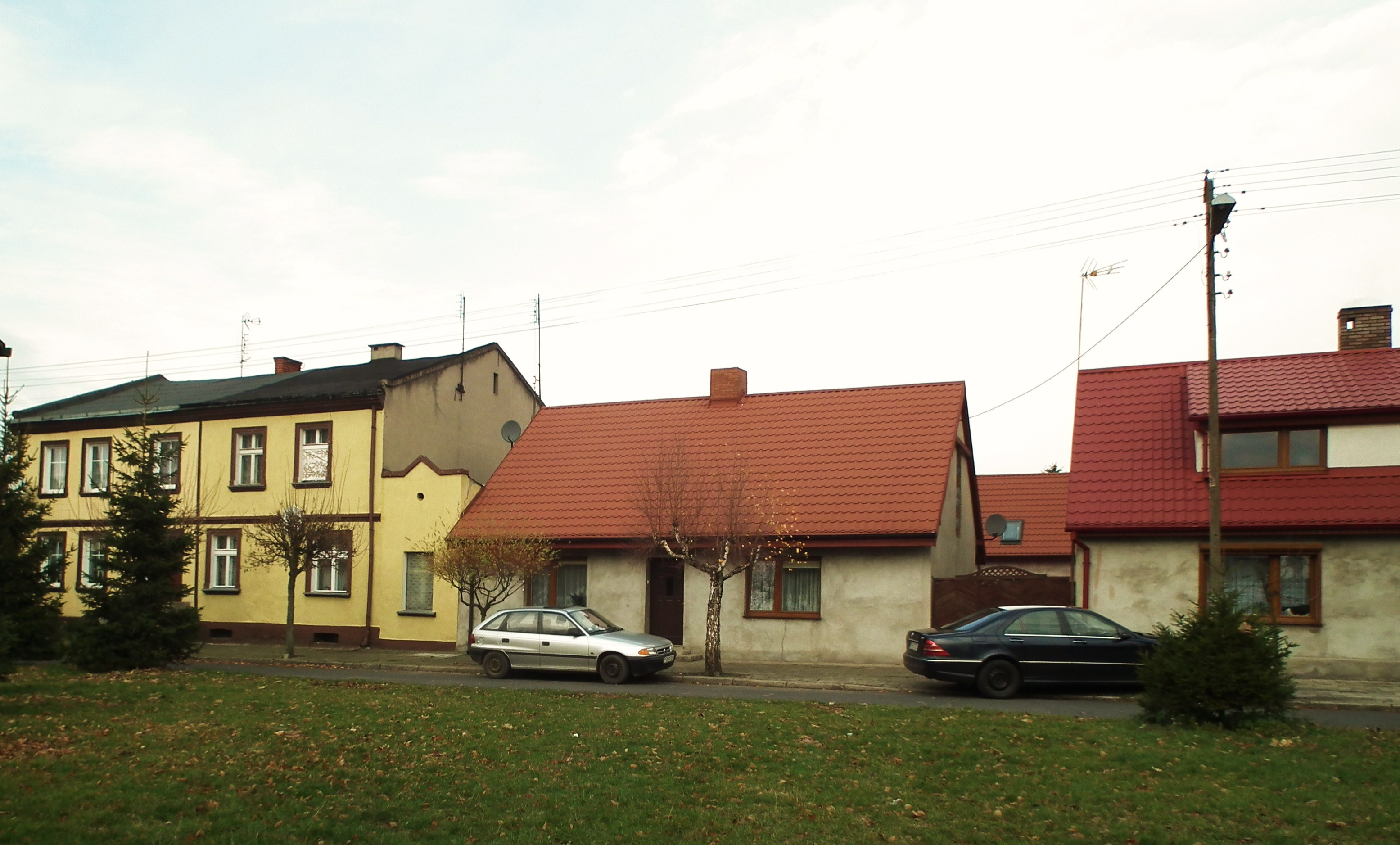 Rynek w Mielżynie.